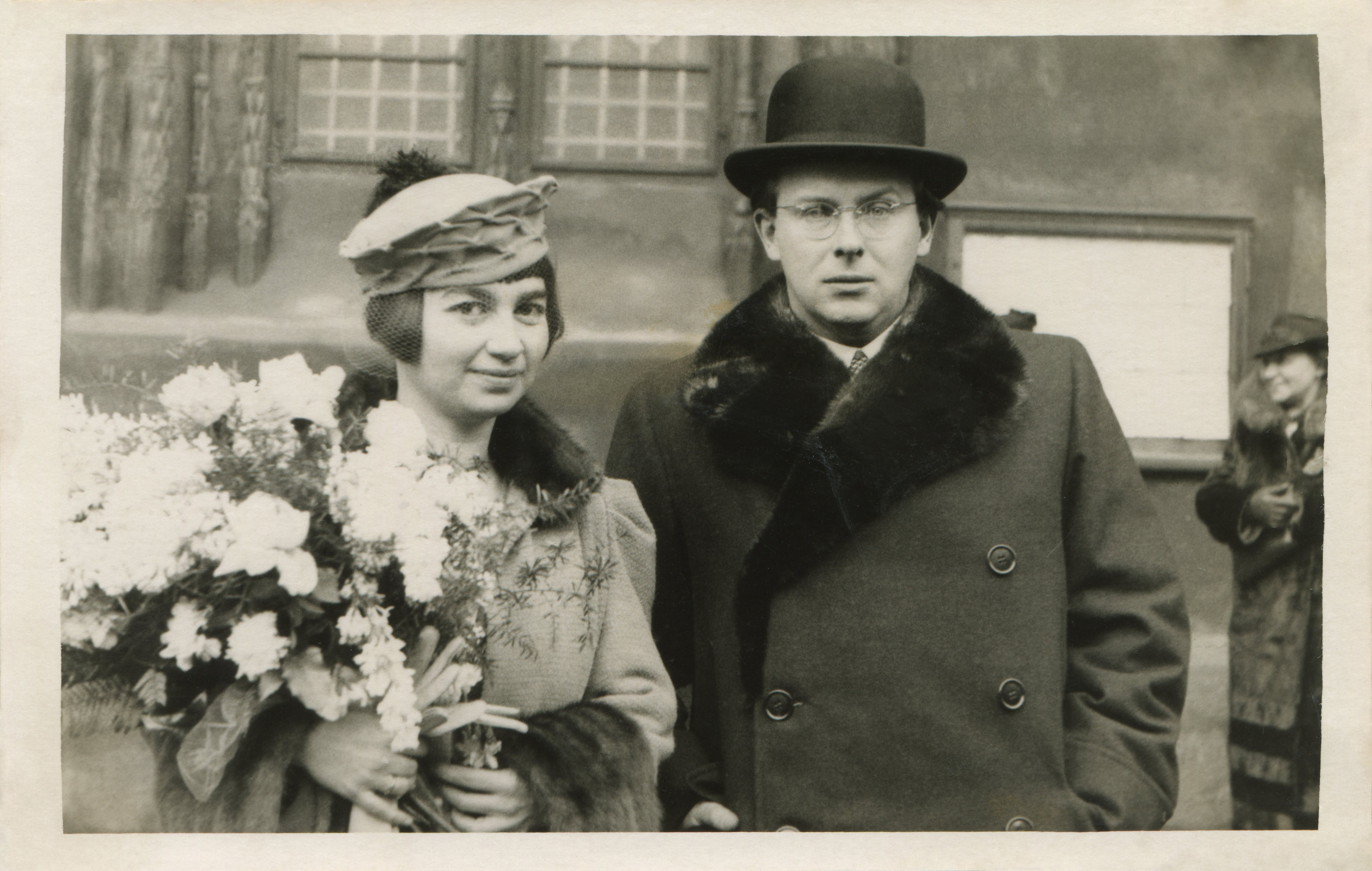 Váša Příhoda, Jindřiška Kreuzová, 19. 12. 1936 v Praze před Staroměstskou radnicí